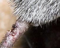 Ausschnitt aus Image:Acomys.cahirinus.cahirinus.6872.jpg soll nach späterer Aktualisierung erhalten bleiben. (Original text: Schwarze Nil-Stachelmaus (Acomys cahirinus cahirinus) im Zoo Leipzig) Quellenangabe und Beleg an erbeten.